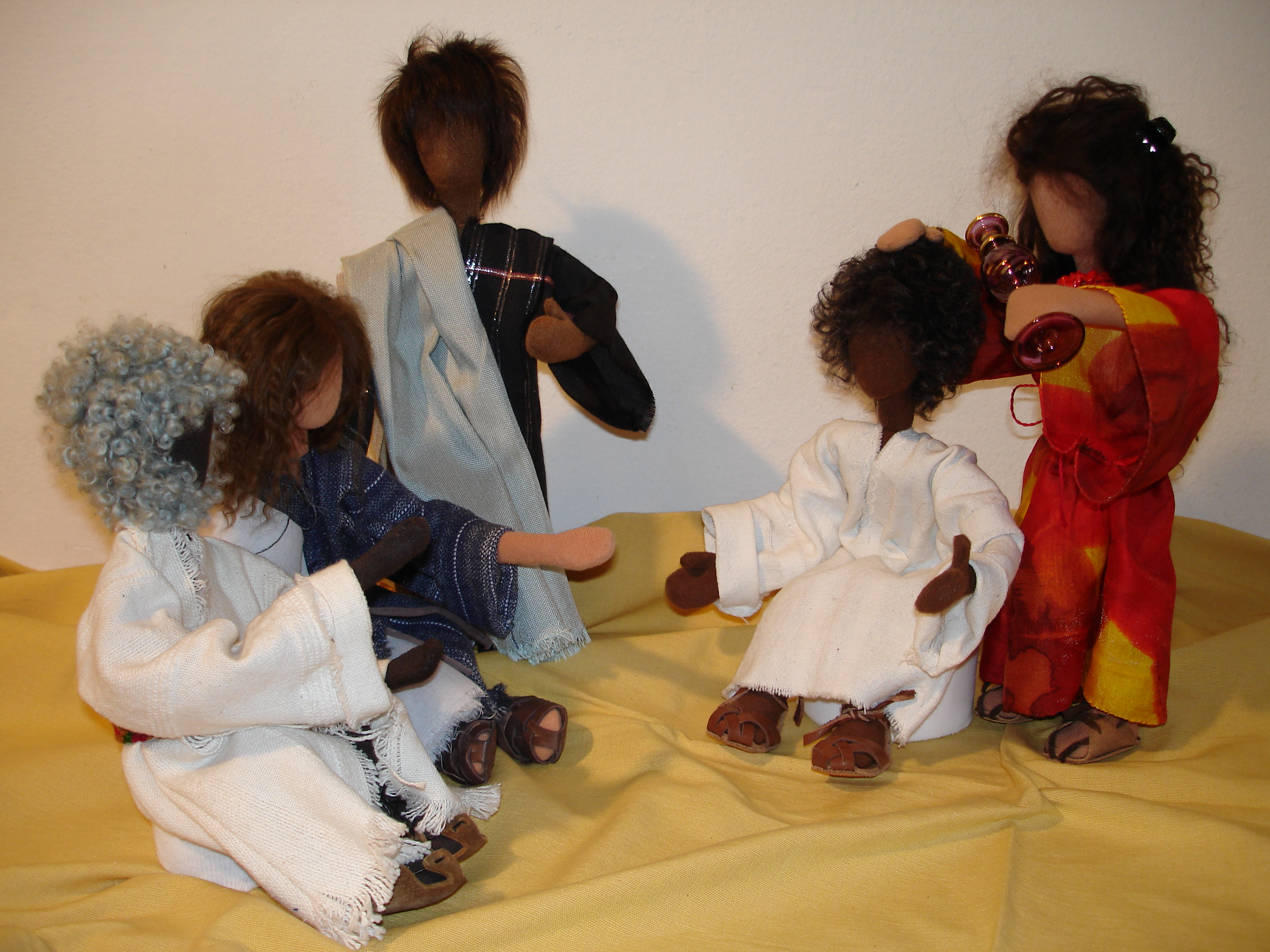 Egli-Figuren-Szene: Die Sünderin salbt Jesus